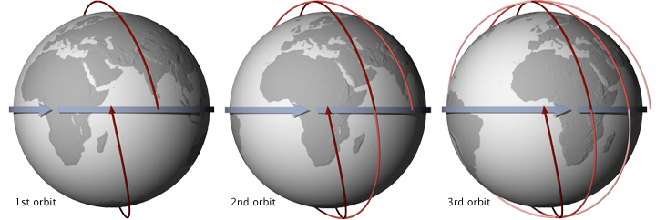 Sun syncronous satellite orbit